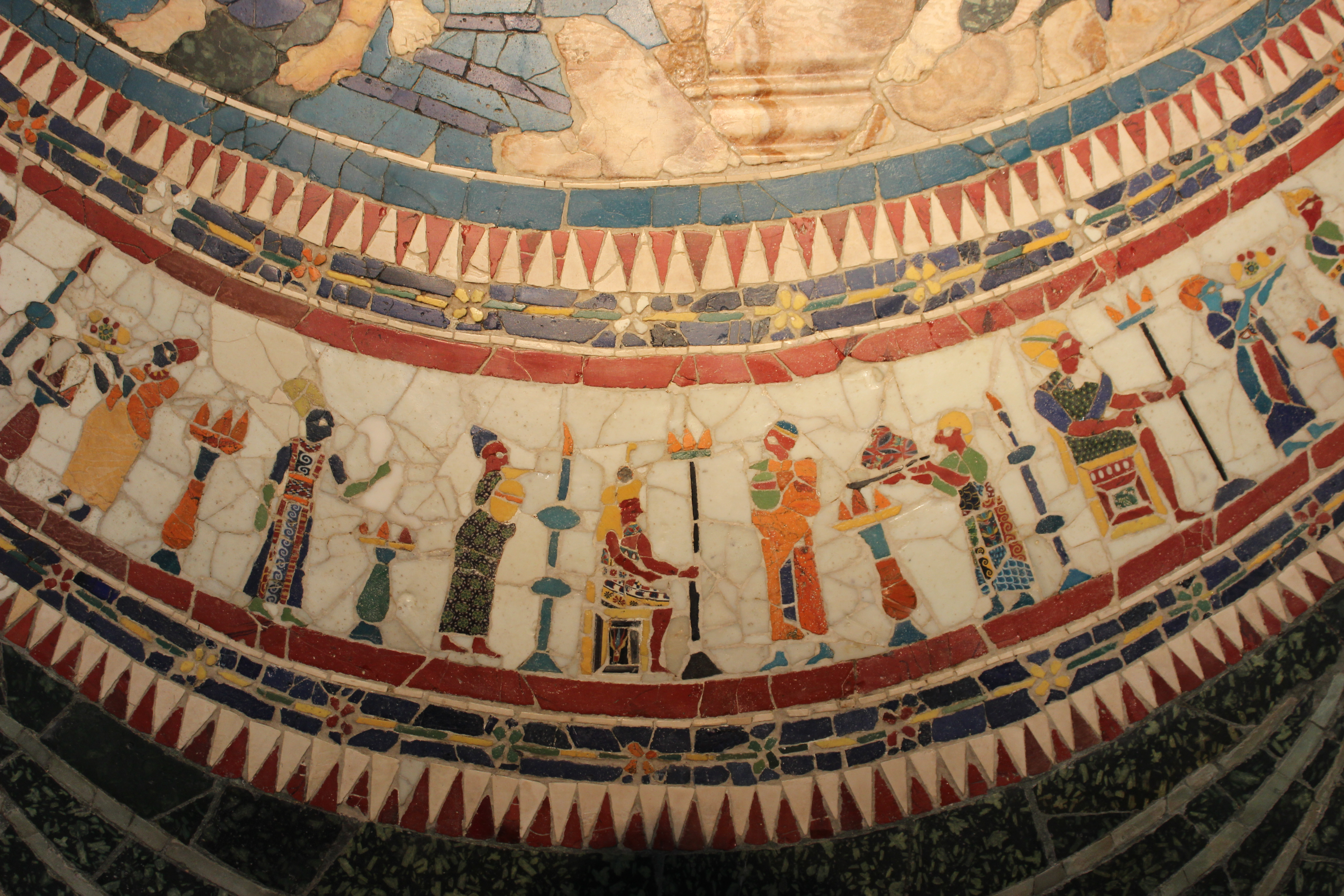 Palazzo Massimo alle Terme. Opus sectile de la basílica de Junio Basso.